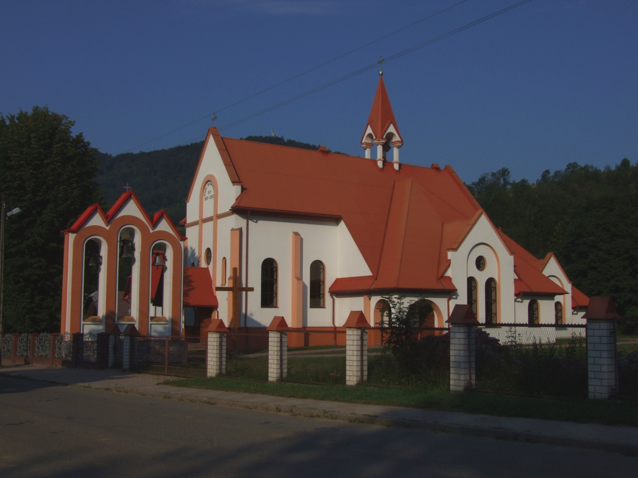 Kościół w Łomnicy-Zdrój